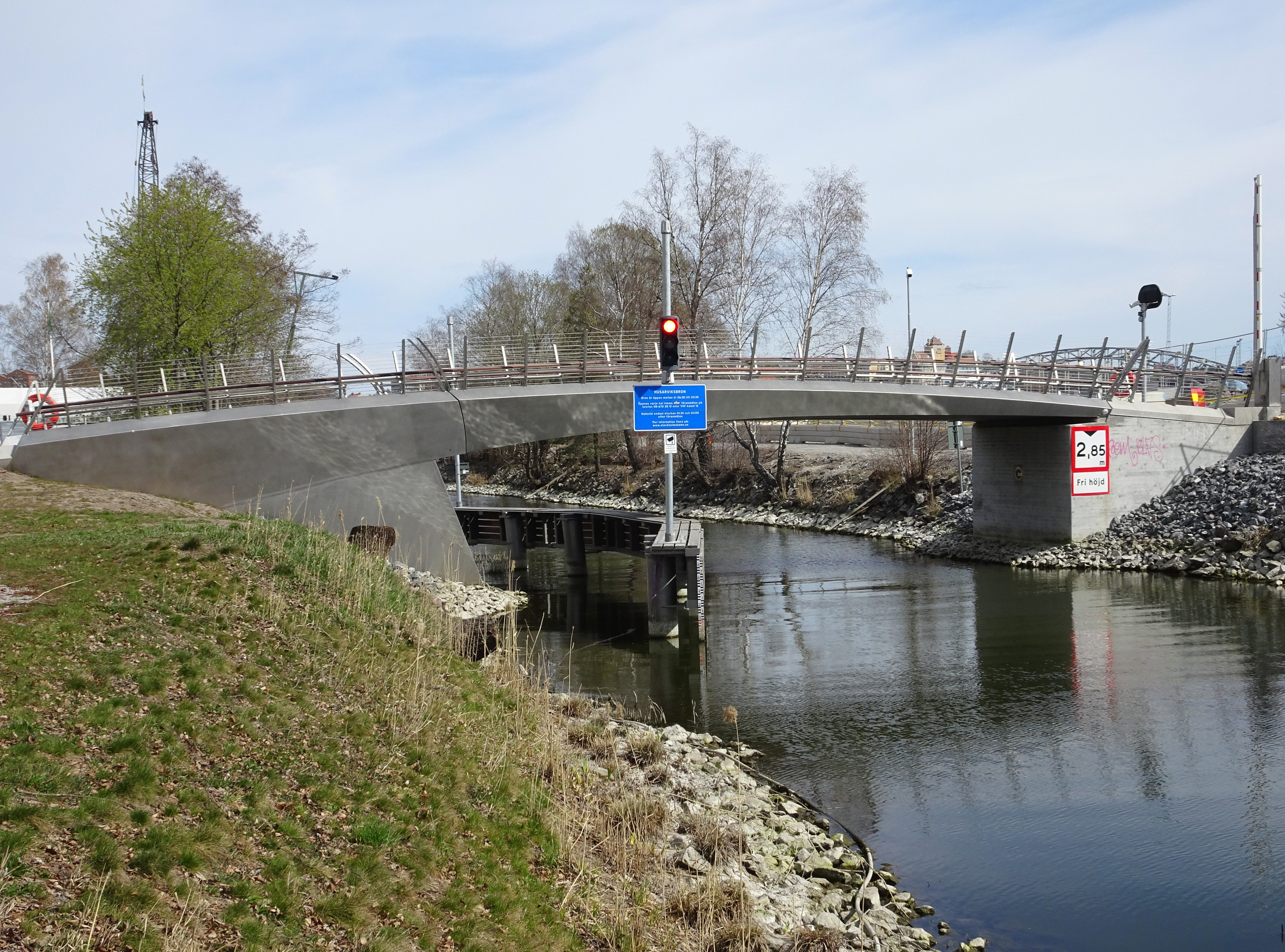 Husarviksbron, arkitekt &Rundqvist